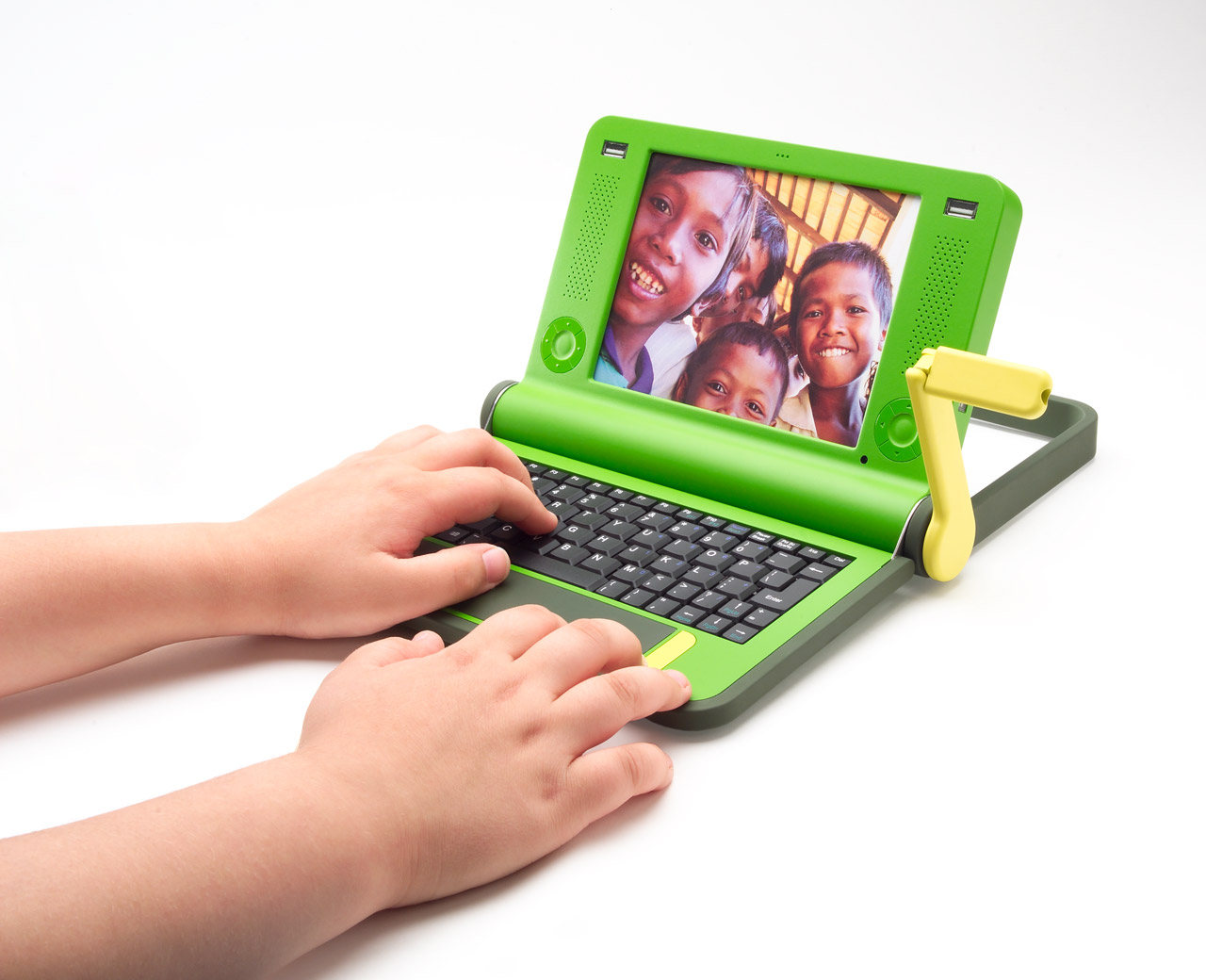 $100 Laptop prototype